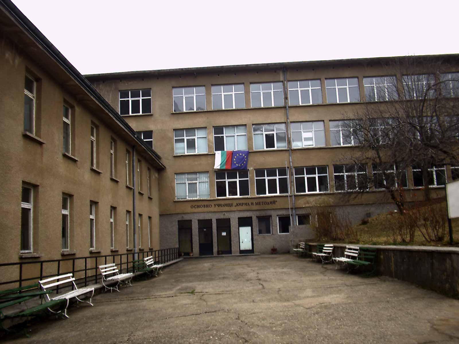 ОУ "Св. св. Кирил и Методий" - Гара Бов